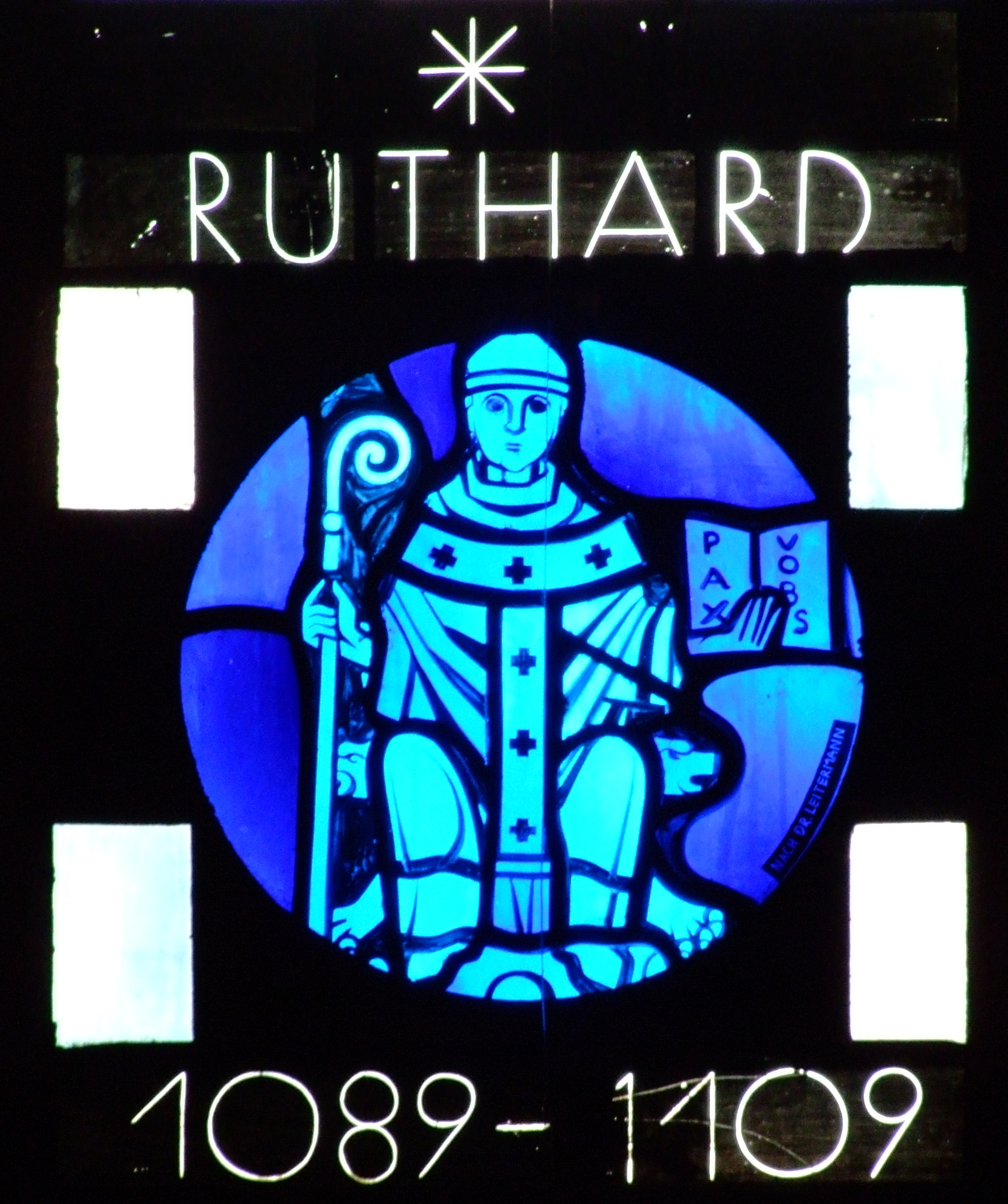 Glasbild des Bischof Ruthard im Dom zu Mainz.